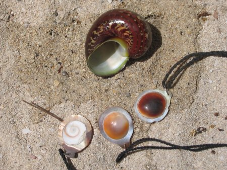 Beschreibung: Turbo radiatus mit Verschlussstein Ort: Togian Islands/Sulawesi/Indonesien Quelle: eigene Fotografie Urheber: Klaus Polak Datum: August 2004